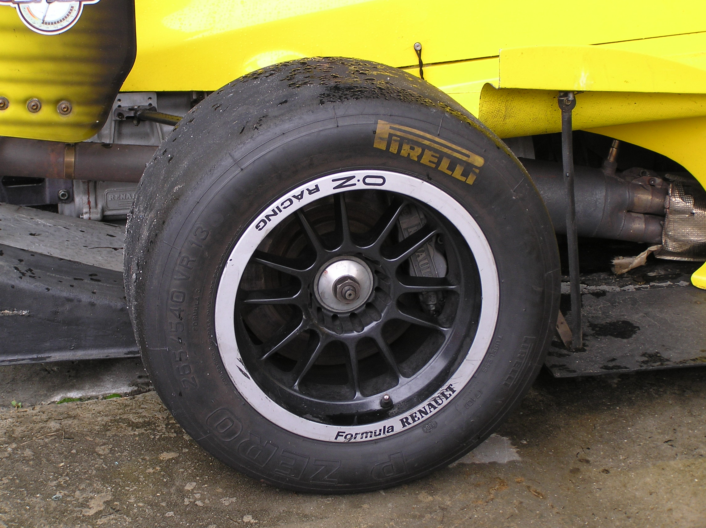 Formula Renault, Pirelli tyre in Brasil